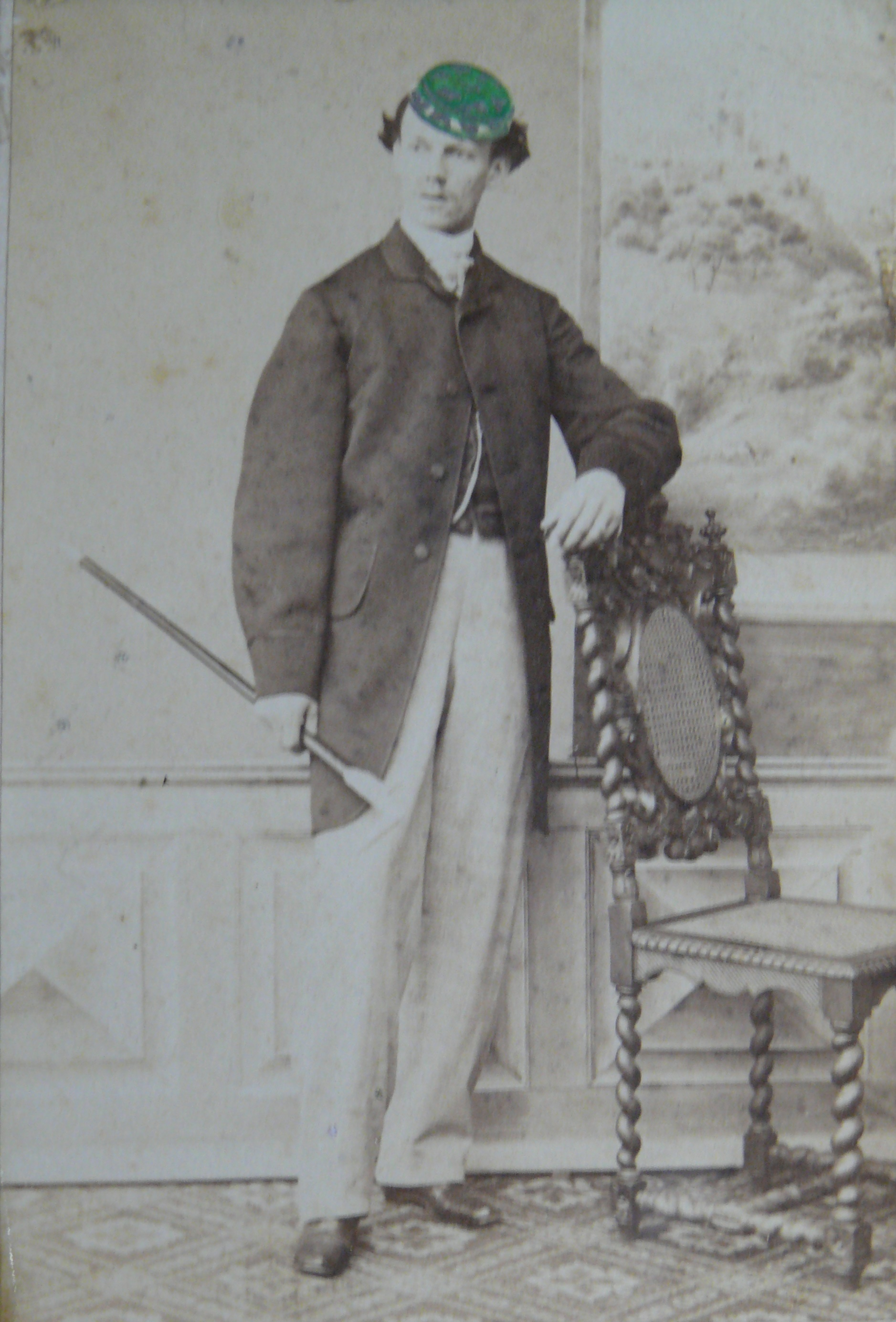 Porträtfotografie von Hans von Bodenhausen-Degener